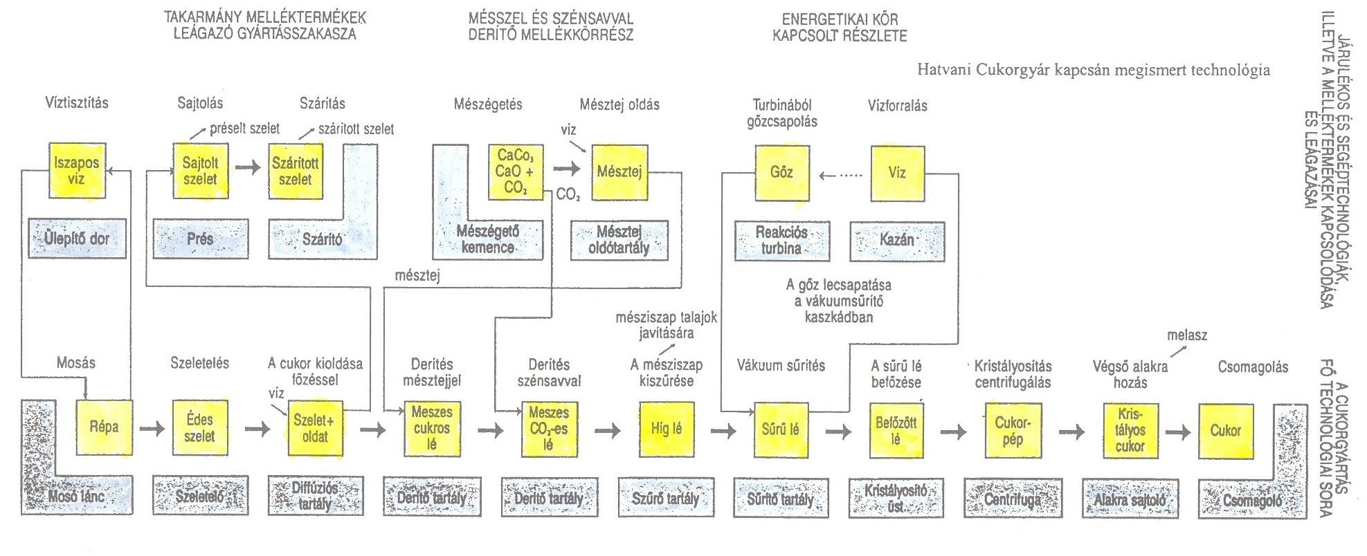 A cukorgyártás műveletei